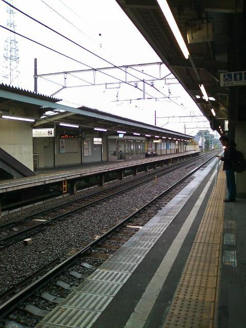 京王井の頭線 三鷹台駅ホーム